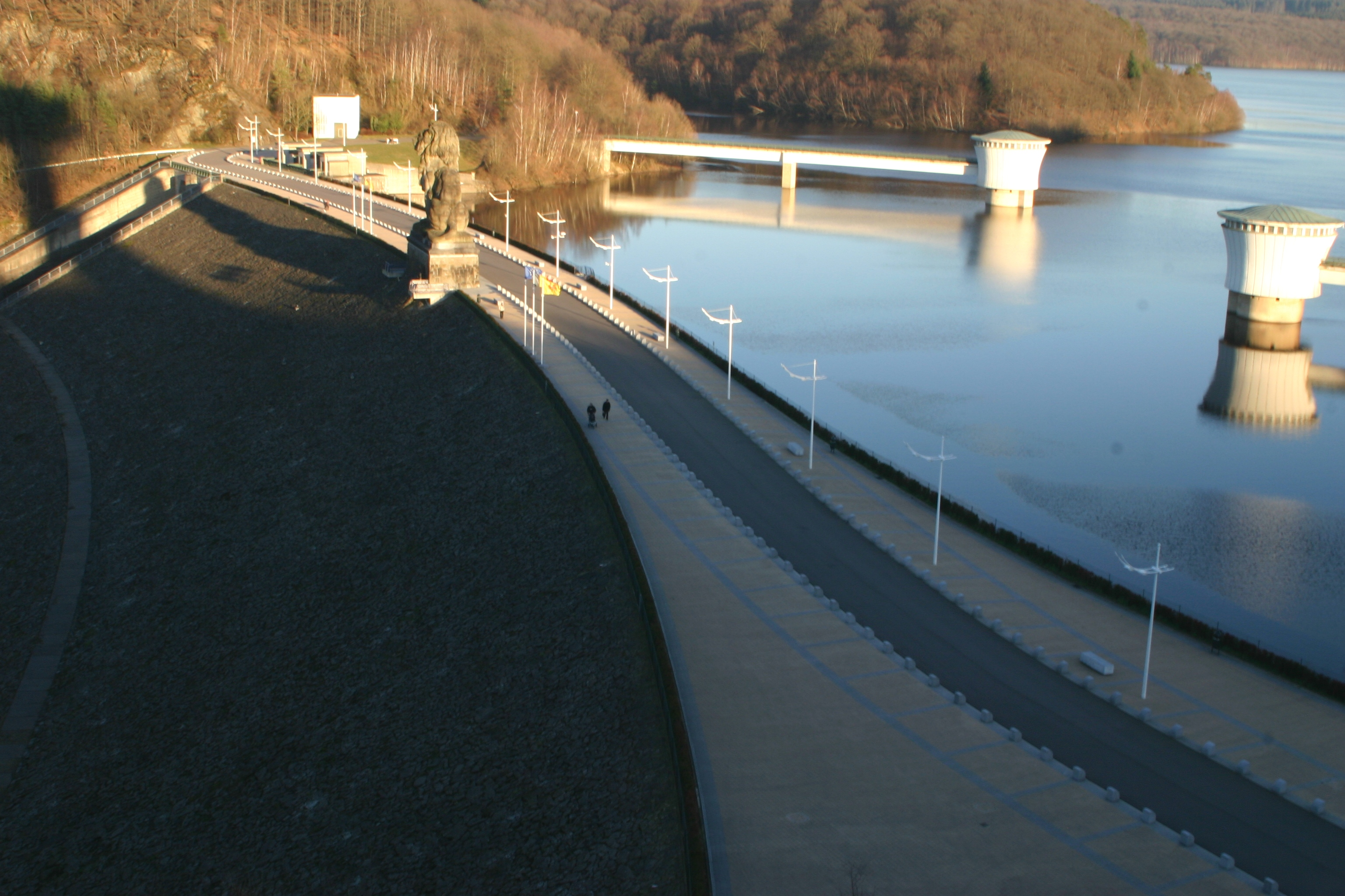 Vue op d'Kroun vun dem Staudamm.